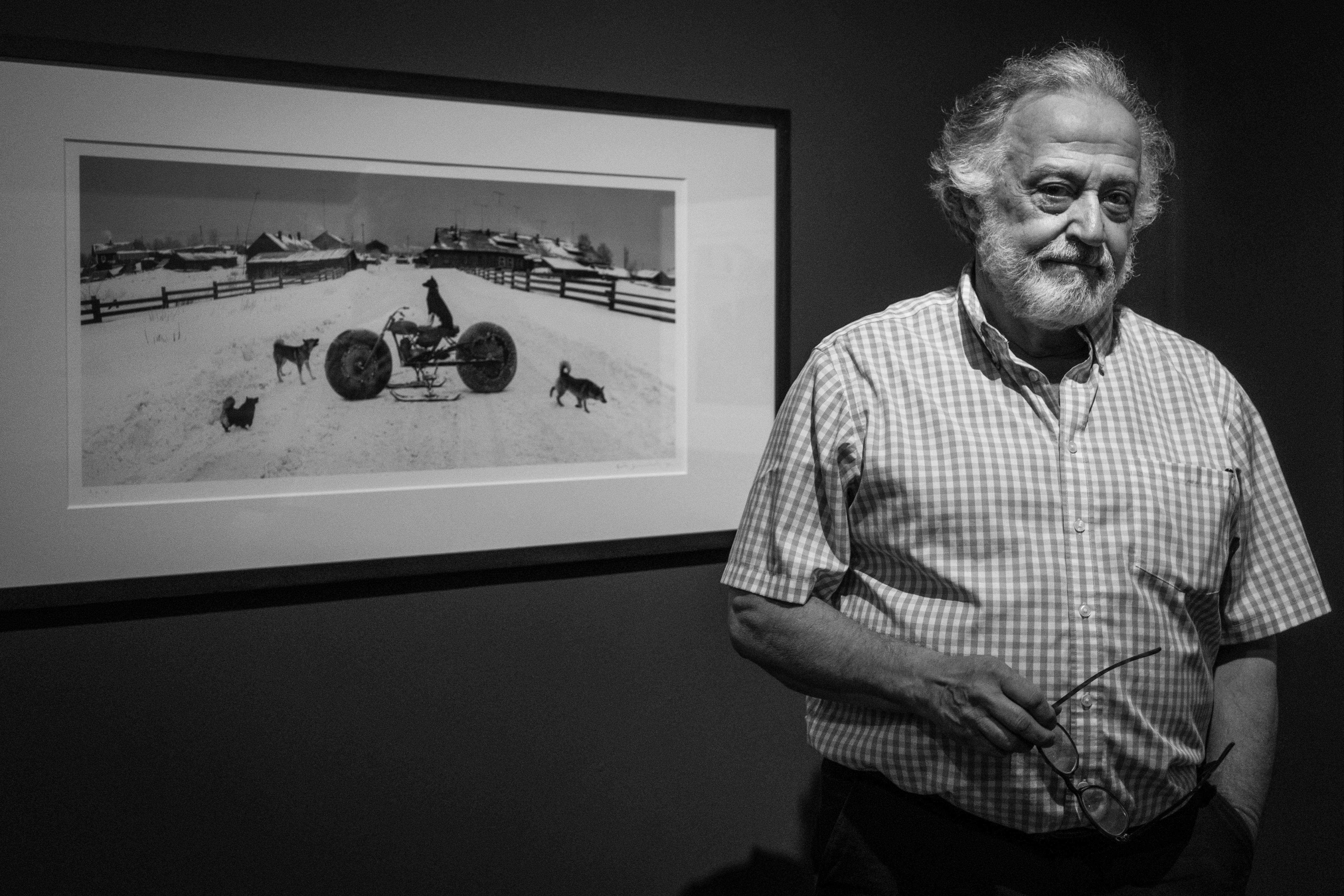 Pentti Sammallahti par Claude Truong-Ngoc.